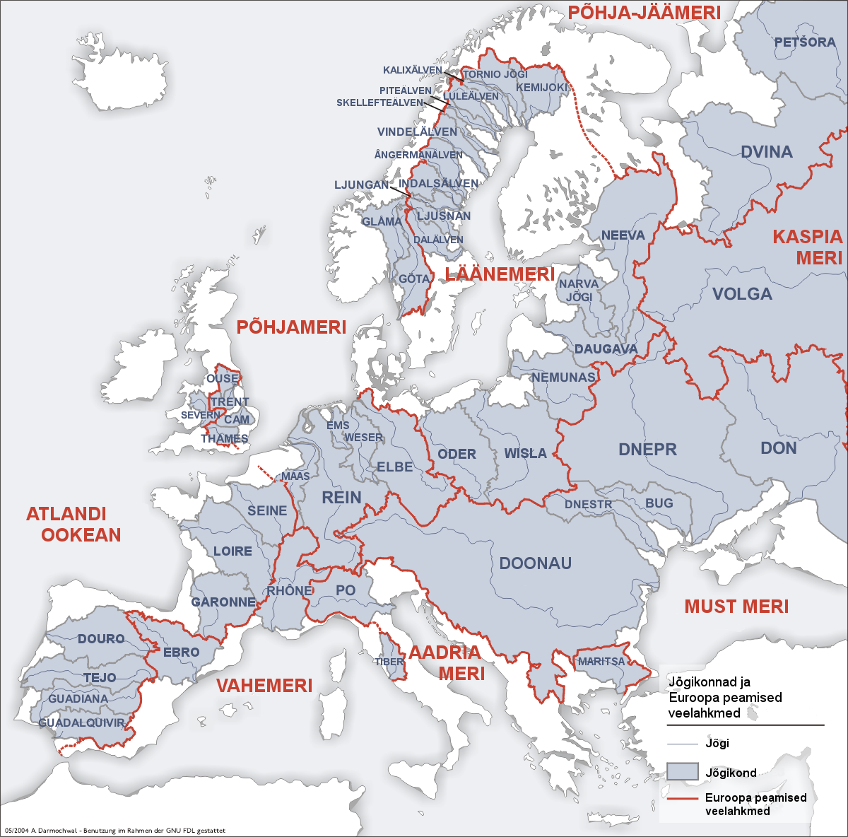 Euroopa peamised veelahkmed ja suuremad jõgikonnad